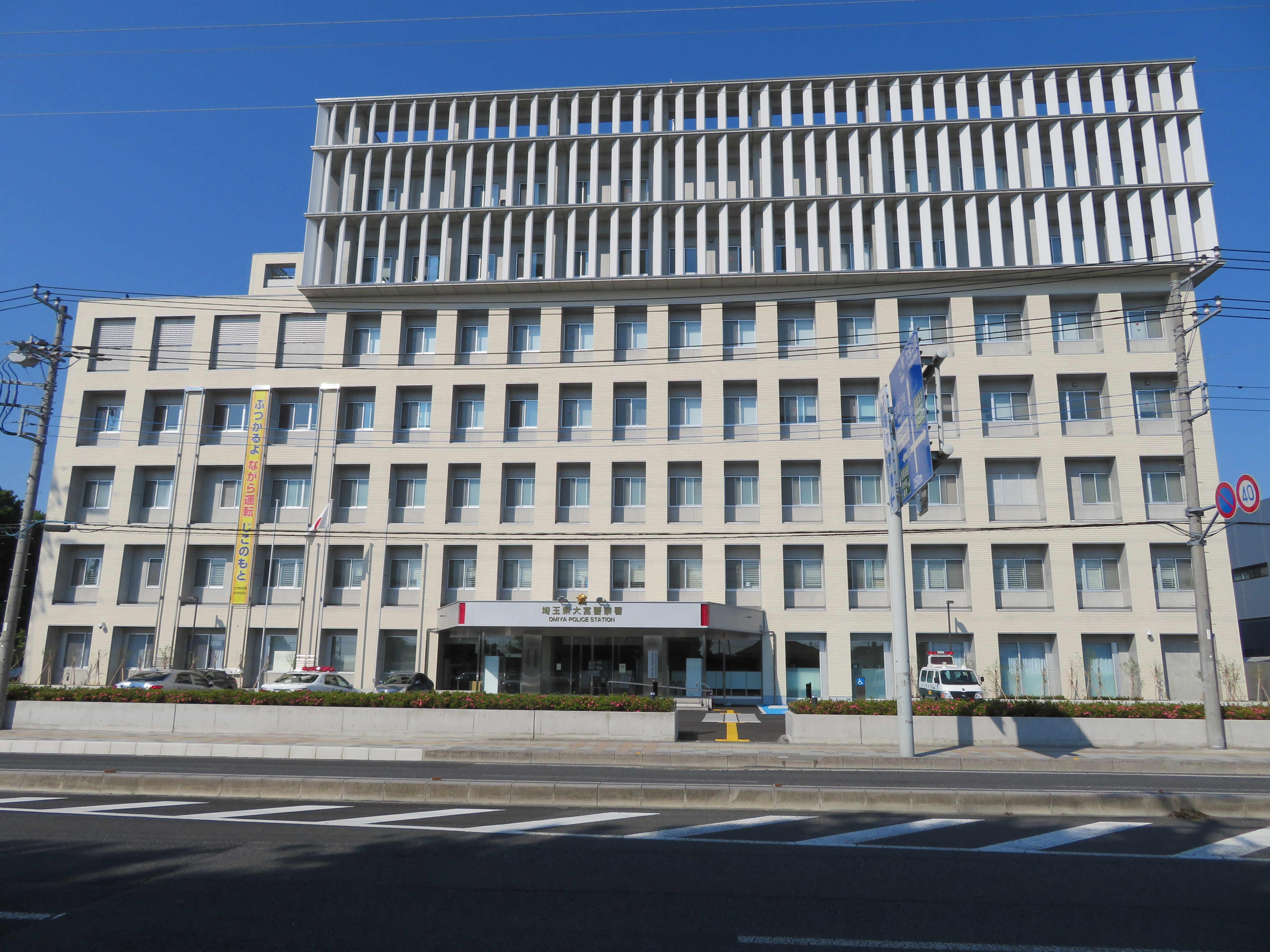 埼玉県大宮警察署庁舎 Canon PowerShot SX720 HS